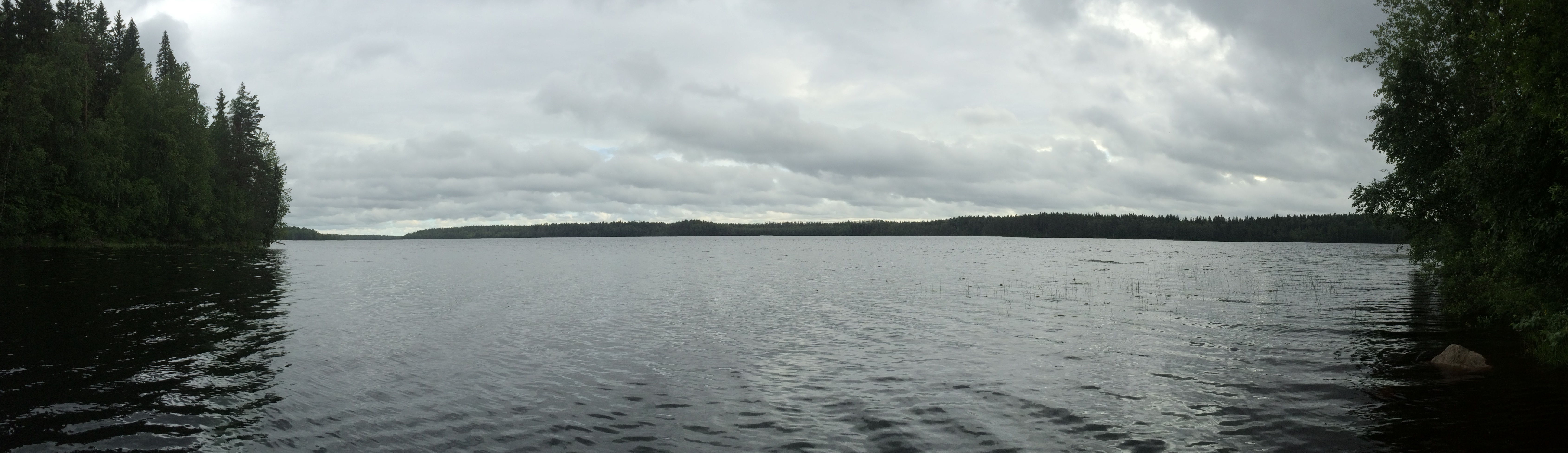 Руокоярви (озеро, Сортавальский район)